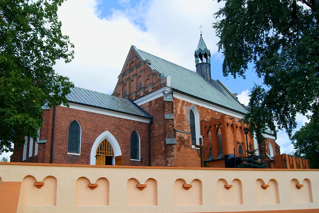 Izbica Kujawska - kościół p.w. Wniebowzięcia NMP, XV, pocz. XX w.